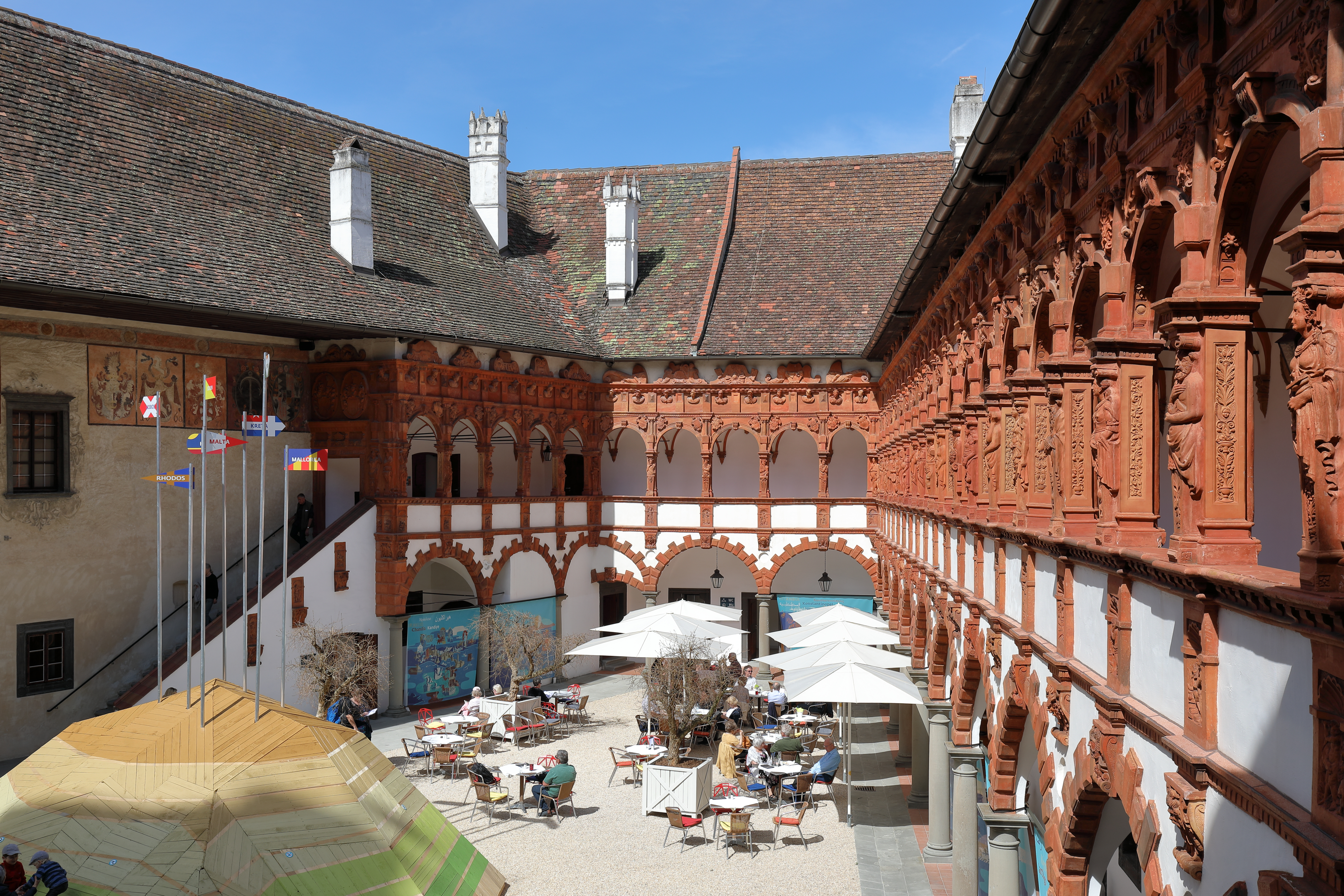 Der großer Arkadenhof des Schlosses Schallaburg in Schallaburg, ein Ortsteil der niederösterreichischen Gemeinde Schollach. Unter Christoph II. von Losenstein erfolgte ab 1540 der Umbau der in der 1. Hälfte des 12. Jahrhunderts errichten Burg zu einem Renaissanceschloss. Dabei wurde unter anderem der nördliche Teil der Ringmauer geschliffen und 3 Renaissance-Trakte mit zwei Türmen um einen großen Hof in Form eines Trapezes errichtet. Die Arkaden des weiten Hofes wurden um 1575 errichtet. Sie erhielten eine Terrakottaverkleidung, die aus rd. 1600 Einzelteilen besteht und die in dieser Art ein singuläres Denkmal in der sogenannten deutschen Renaissance sind.